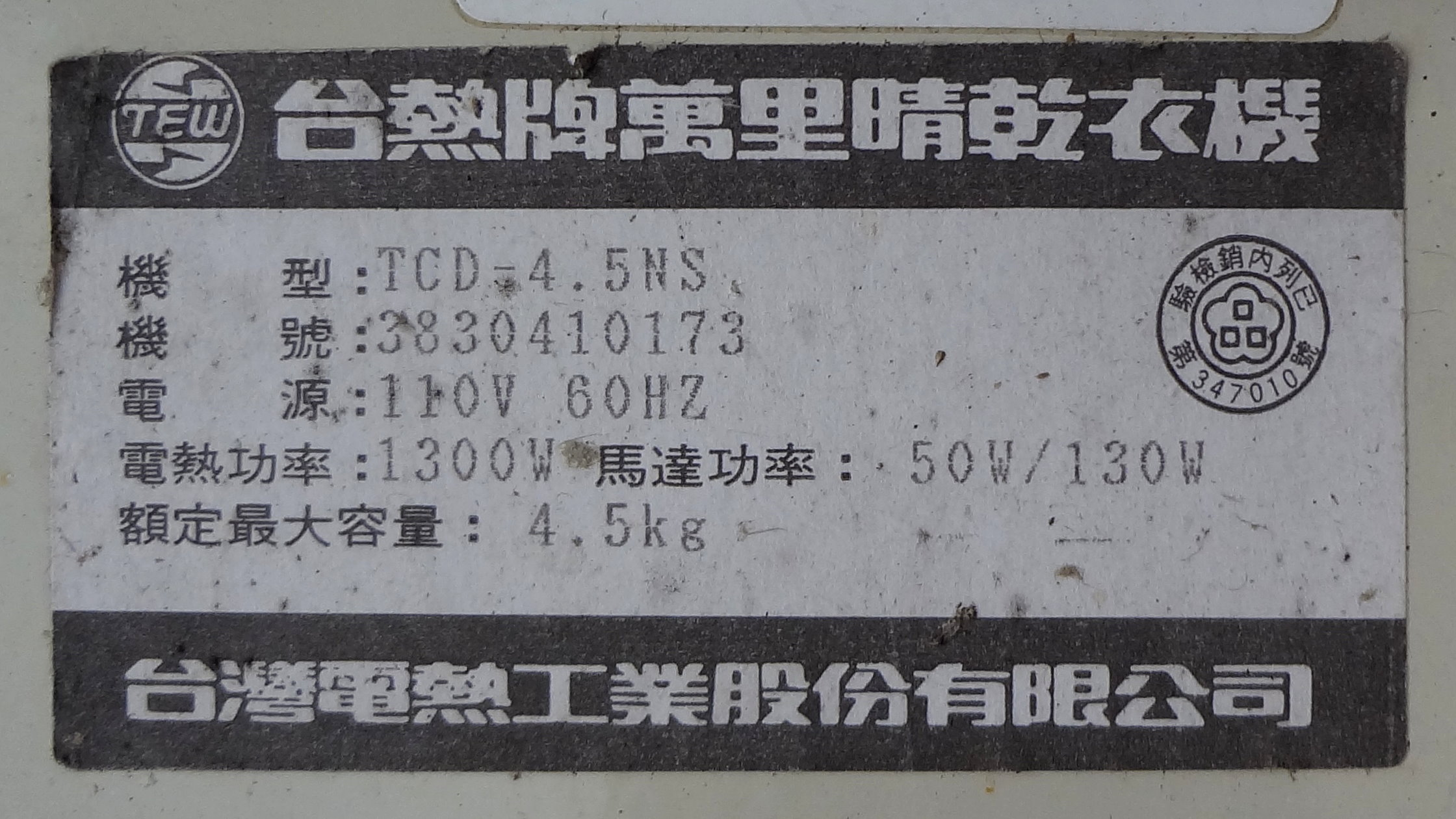 台熱牌萬里晴乾衣機TCD-4.5NS機身背面規格標籤。